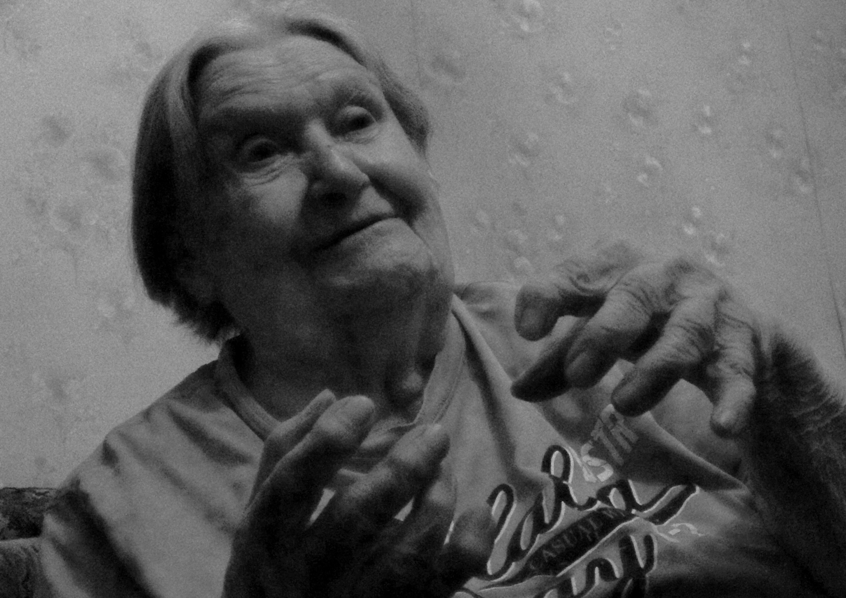 Встреча с российским генетиком Натальей Львовной Делоне в декабре 2018 года в Моссве